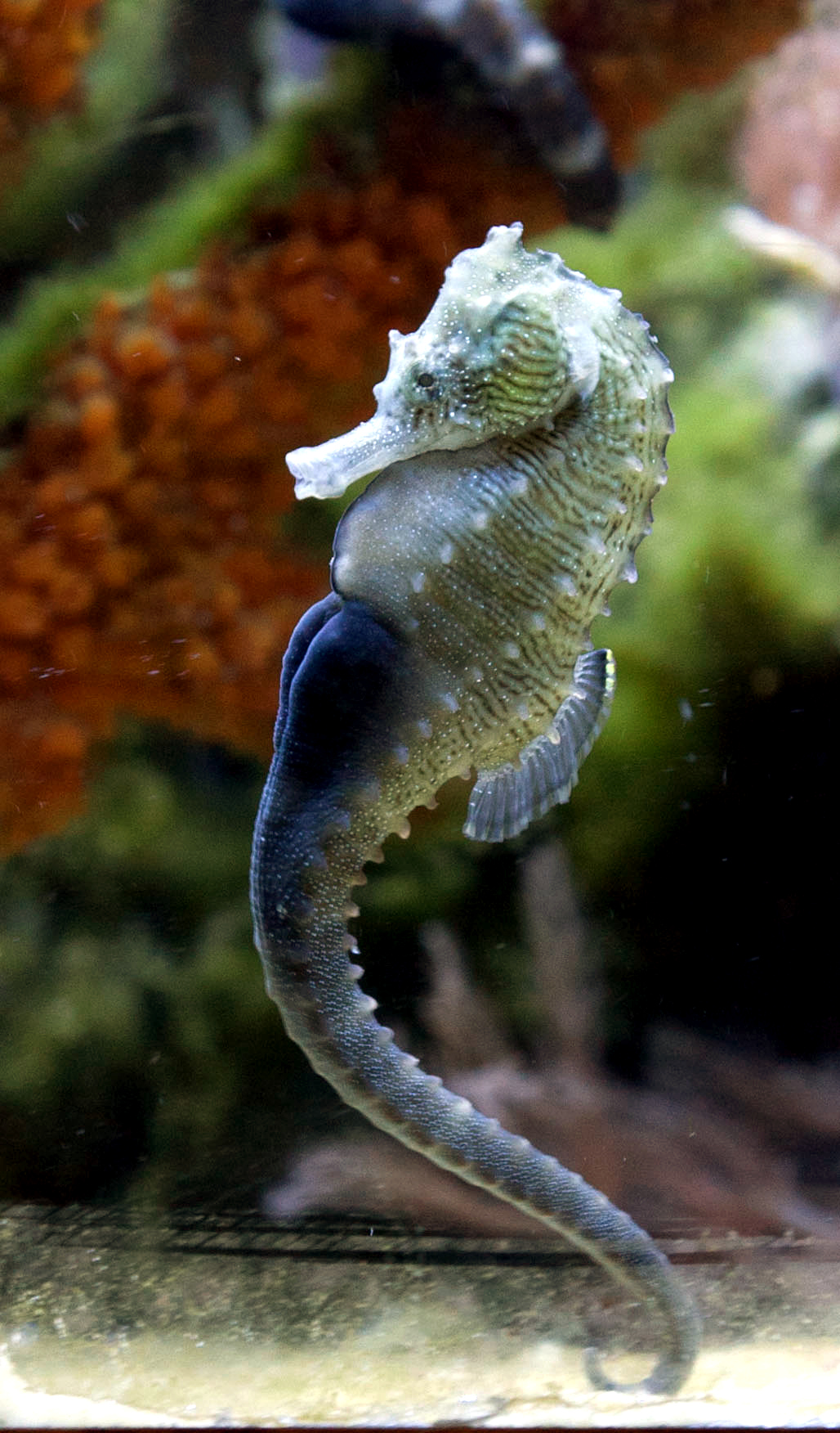 Hippocampus erectus, macho preñado